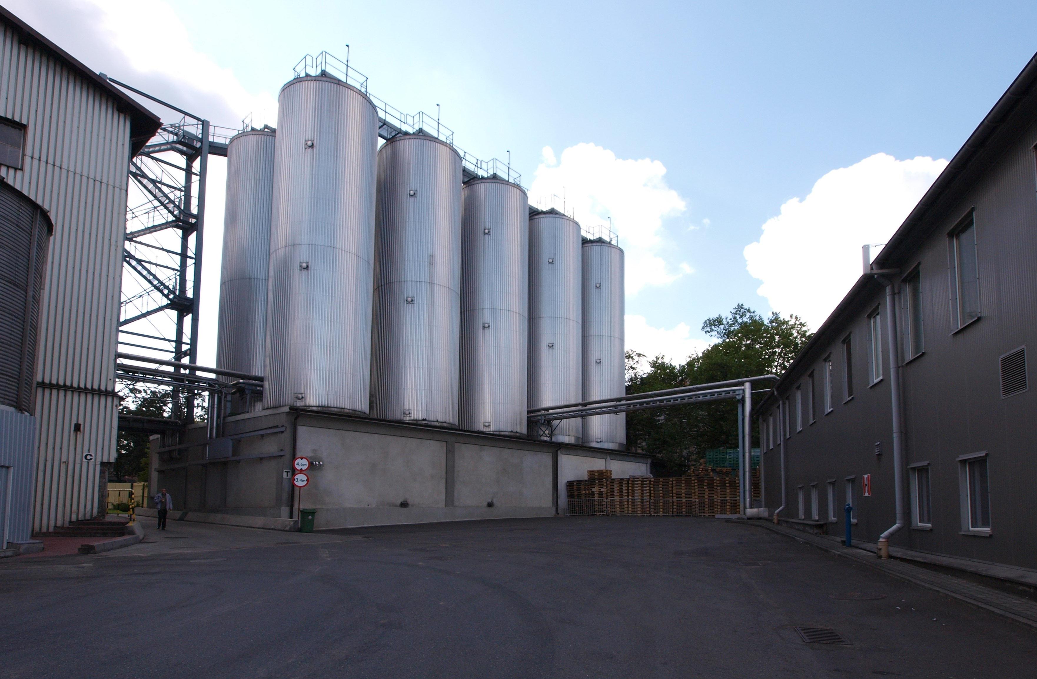 Browary Górnośląskie w Zabrzu. Tankofermentory.